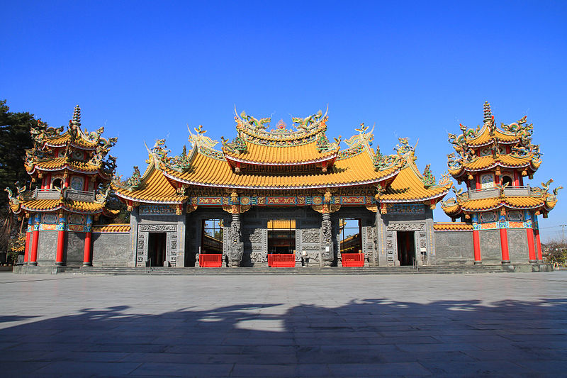 Tour du Tambour (gauche) et tour de l'Horloge (droite) du temple Seitenkyū.